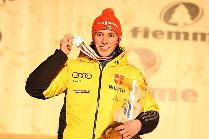 Dekoracja medalowa zawodów indywidualnych HS 134/10 km